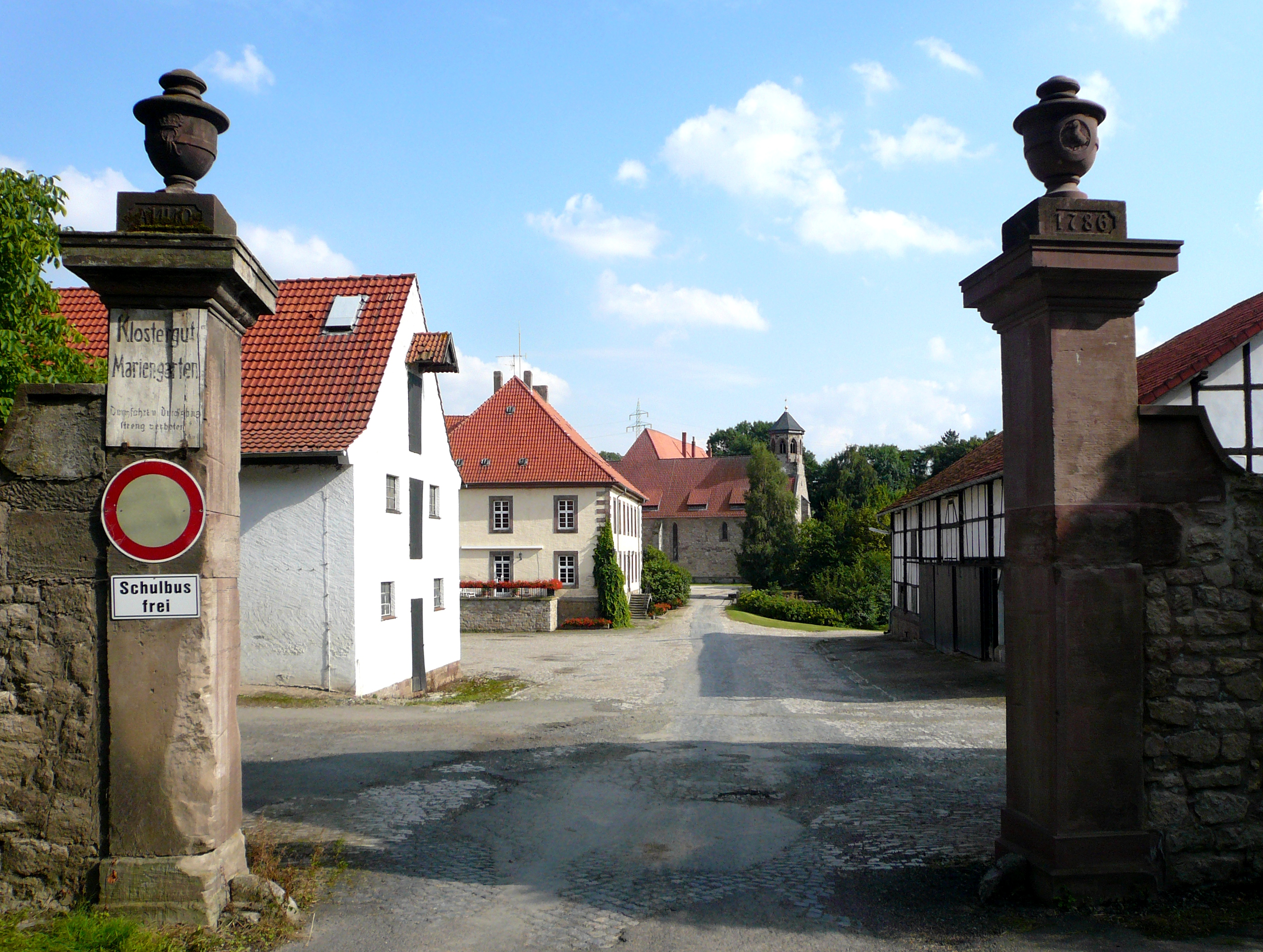 Einfahrtstor von der Landstraße zum Klostergut Mariengarten mit Blick durch das Klostergut zur Klosterkirche, Toranlage erbaut 1786